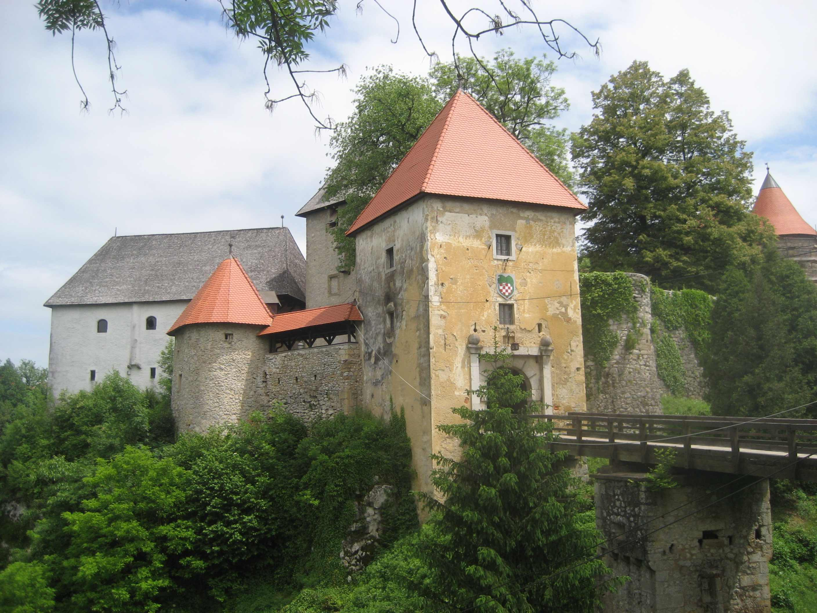 Castle Ozalj, Croatia